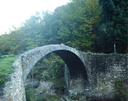 Ponte della Pia